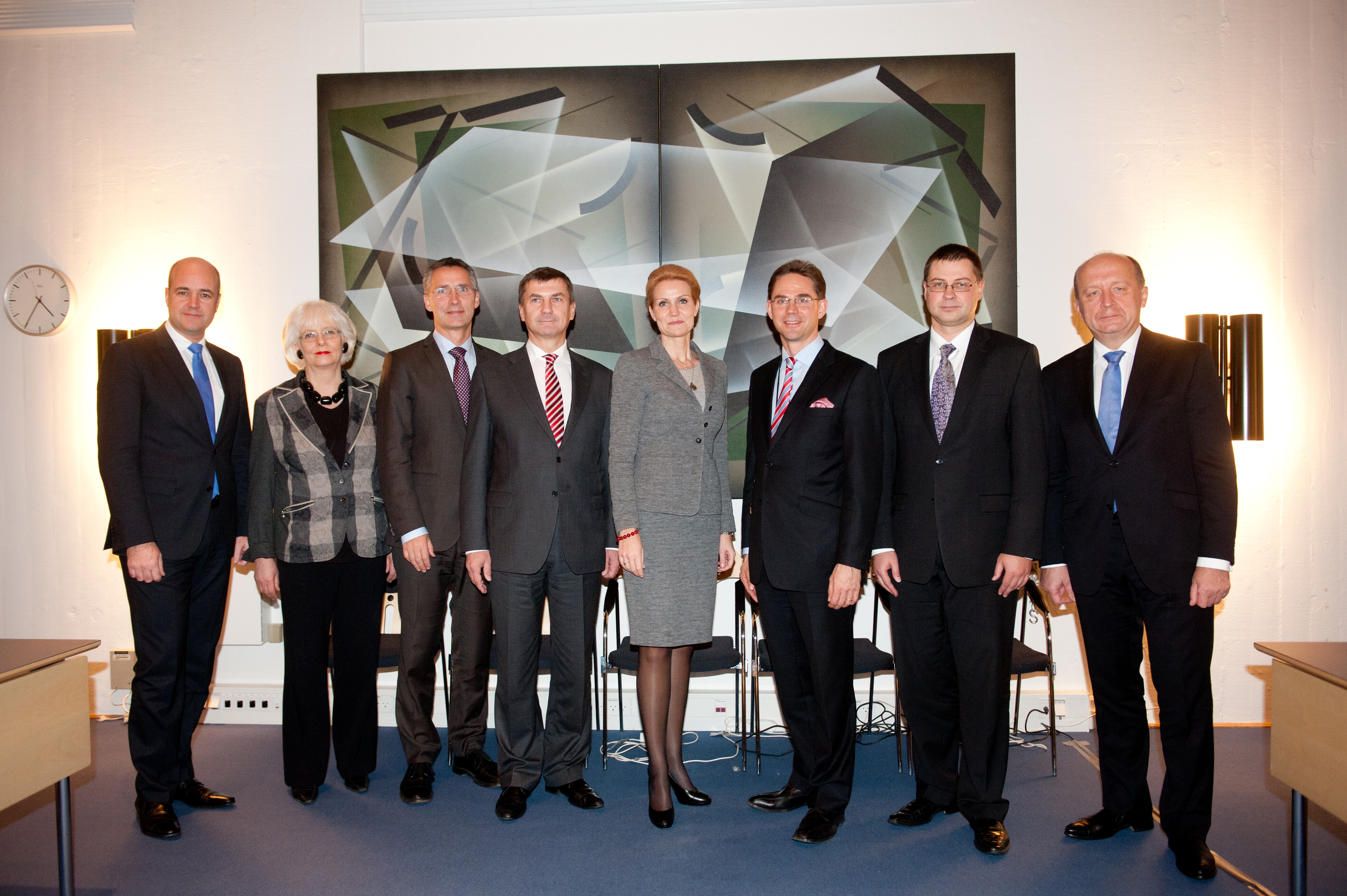 De nordiska och de baltiska statsministrarna samlade för möte i Köpenhamn vid Nordiska rådets session 2011